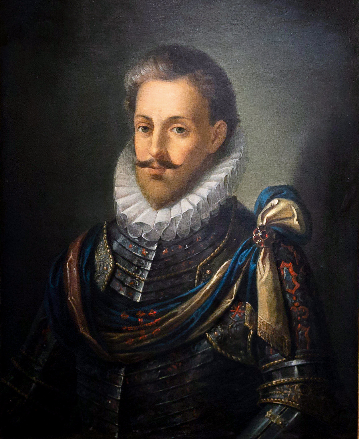 Беларуская (тарашкевіца): Партрэт Мікалая Радзівіла «Сіроткі» (Mikałaj Radzivił «Sirotka»)